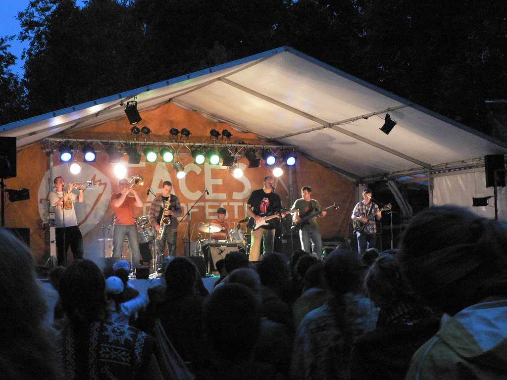 Markscheider Kunst at Faces X